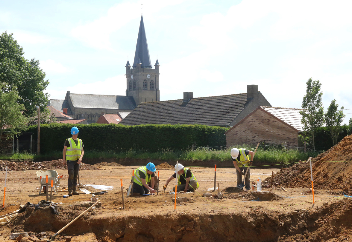 Ausgrabung der Höhe 80 in Wijtschate, im Hintergrund die Kirche. Die orangen Stöcke markieren Stellen mit Resten von gefallenen Soldaten